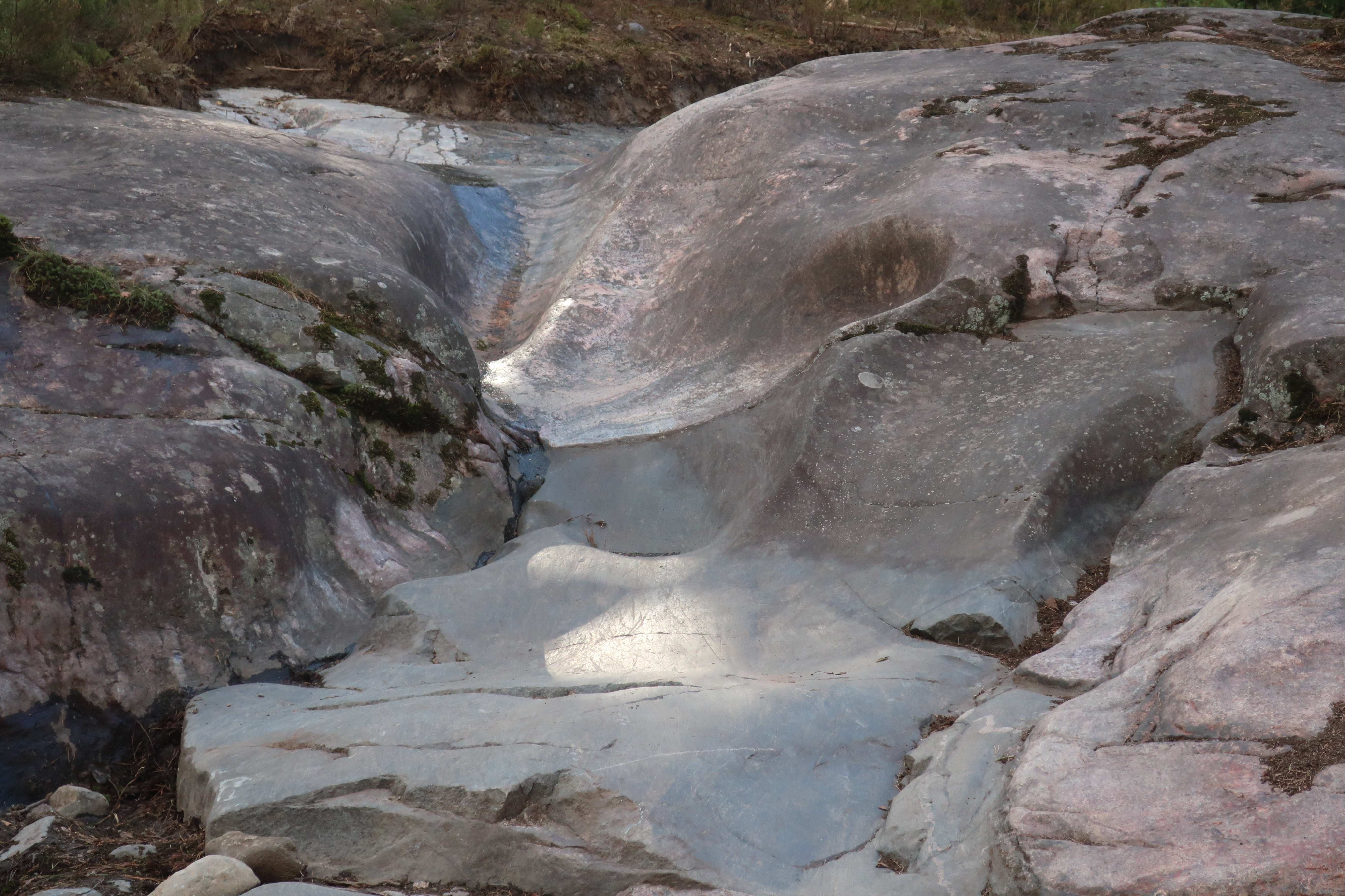 Kokokuva hiidenkourun alueesta Helsingin Vartiokylässä, Viilarintien eteläosassa, Roihupellossa